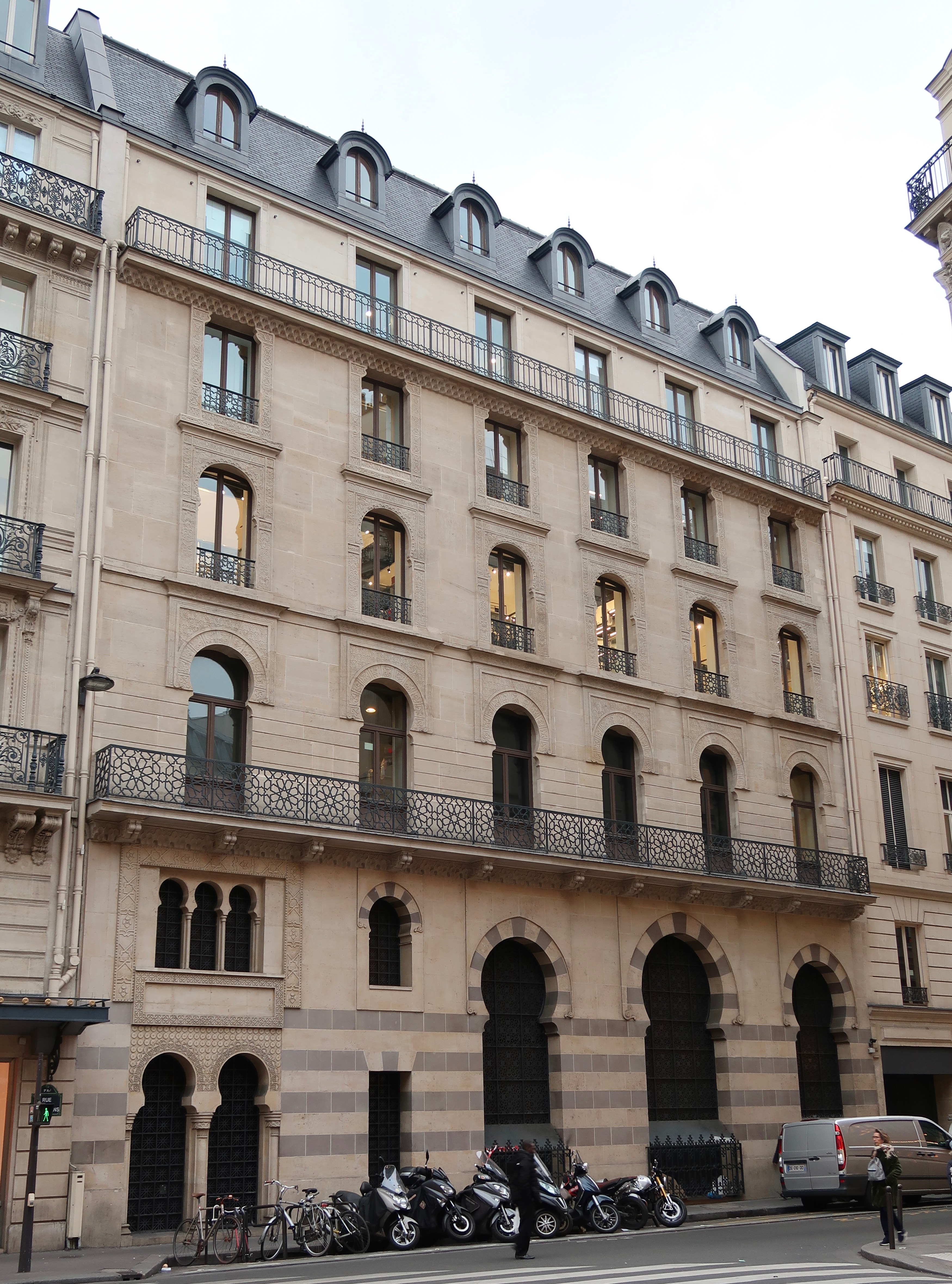 Anciens bains turcs, 18 rue des Mathurins (Paris, 9e).